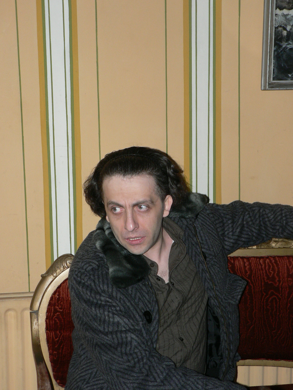 Мариус Куркински